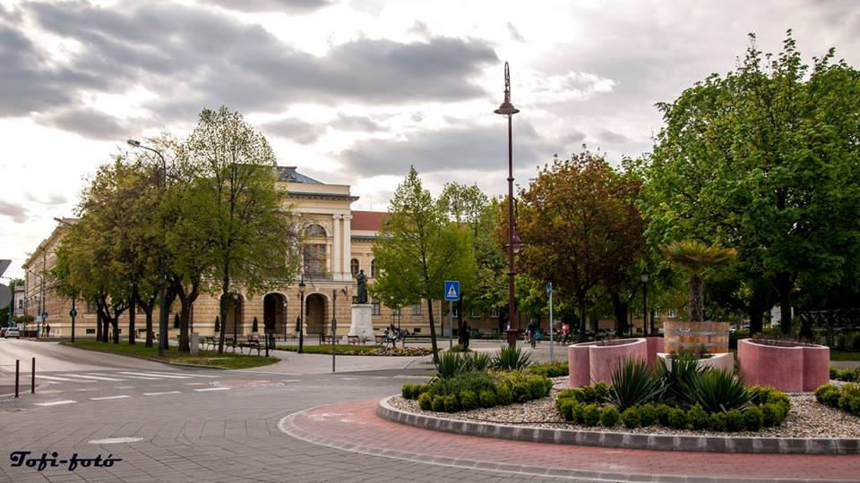 Fotó: Tofán Sándor